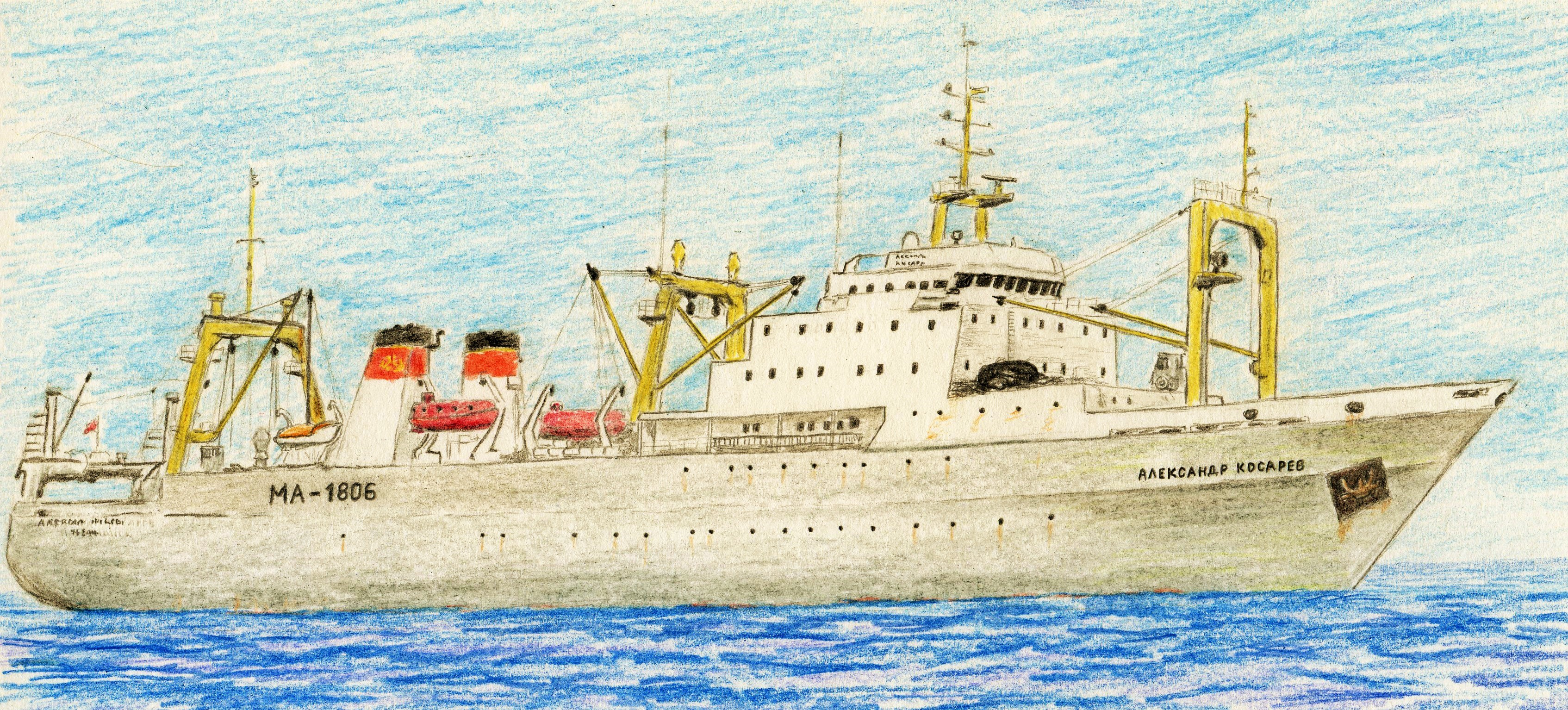 Рыболовный траулер типа "Моонзунд", рисунок